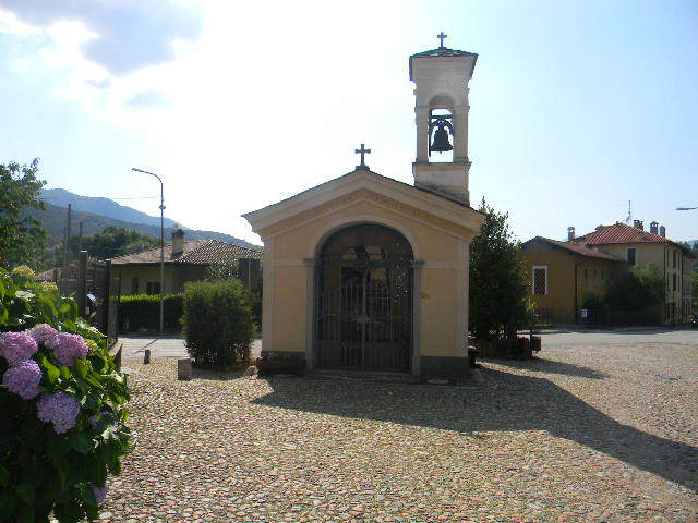 Cappella dedicata alla S. Vergine Addolorata a Brinzio